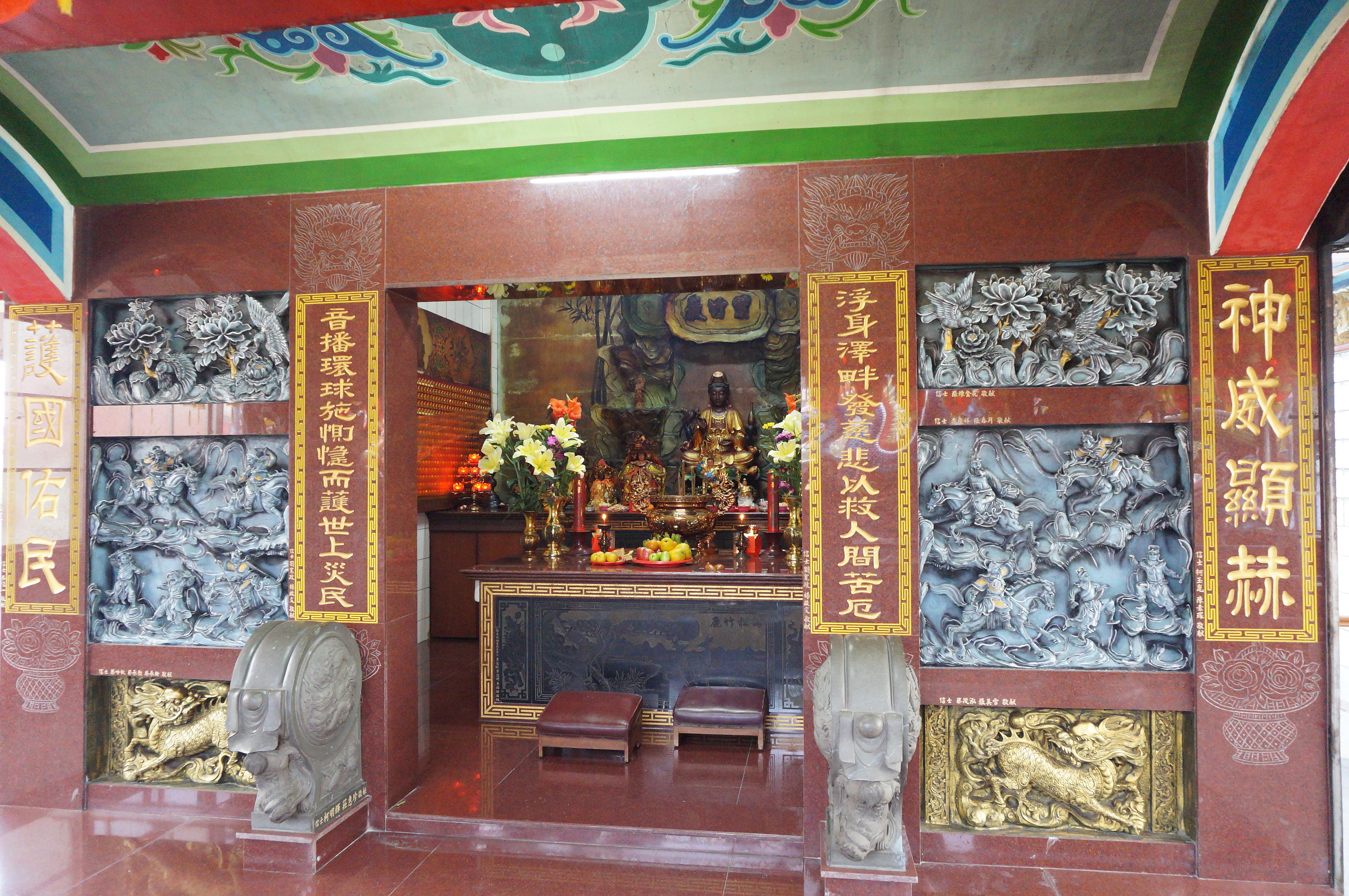 中文（台灣）: 百福中埔福德宮二樓浮音寺廟門。